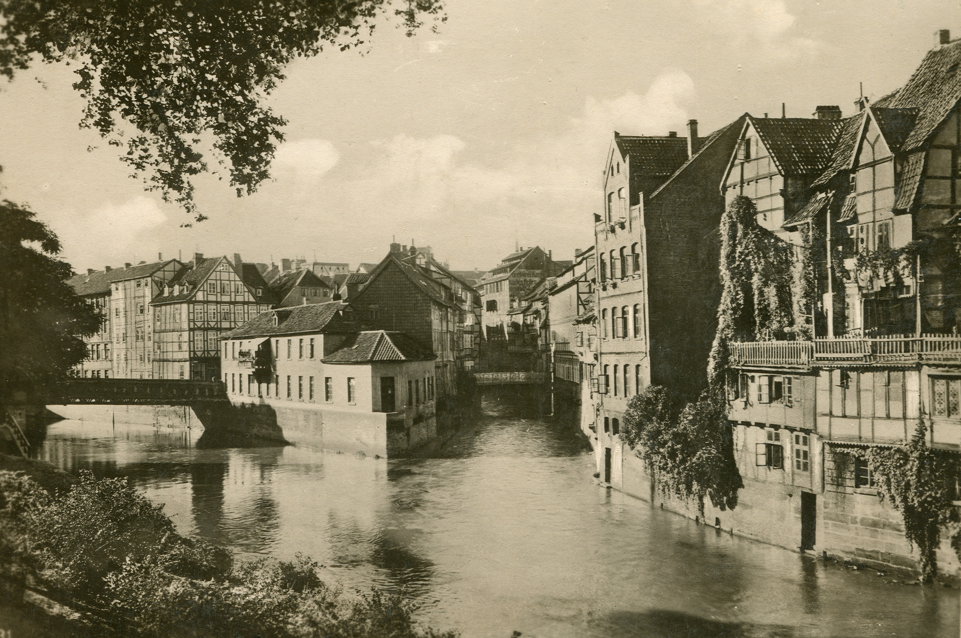 Eine der zahlreichen Ansichten in Richtung Leineinsel Klein-Venedig, die hier von der Sommerbrücke überquert wird ...